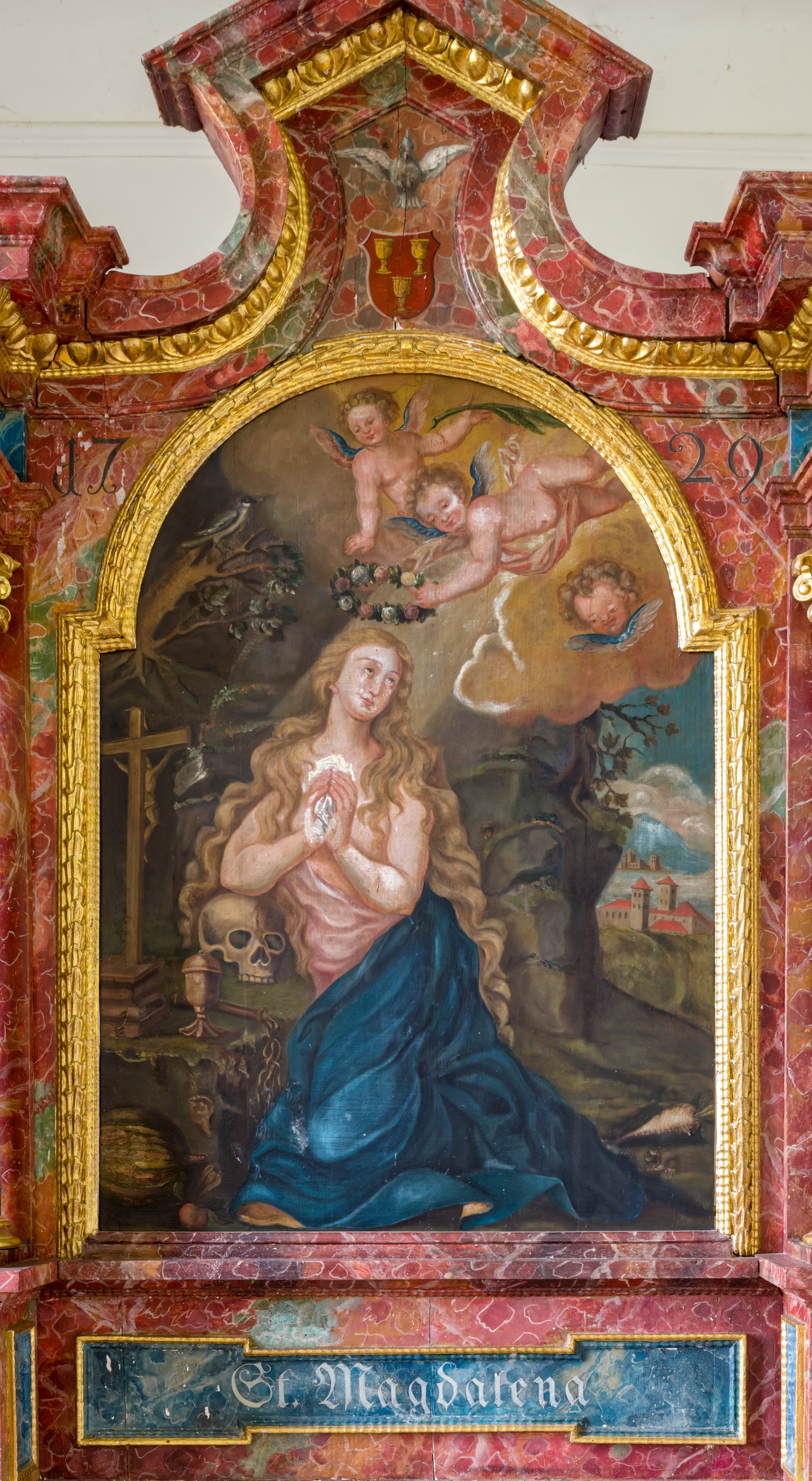 Bilder aus Staufen im Breisgau, die St.Gotthardkapelle